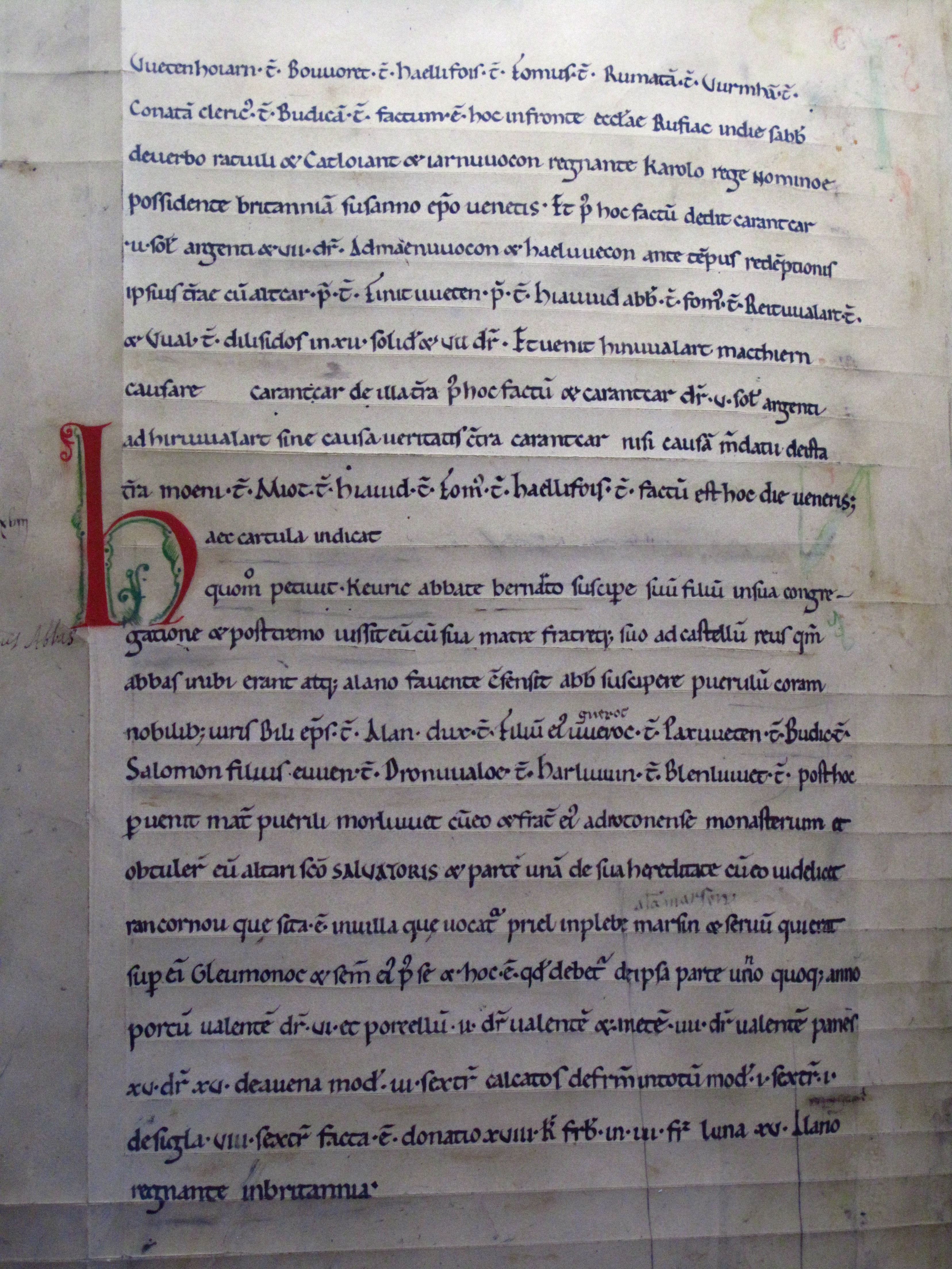 Page du manuscrit du Cartulaire de Redon (Bretagne est Univers, Musée de Bretagne, Rennes, Ille-et-Vilaine, France)